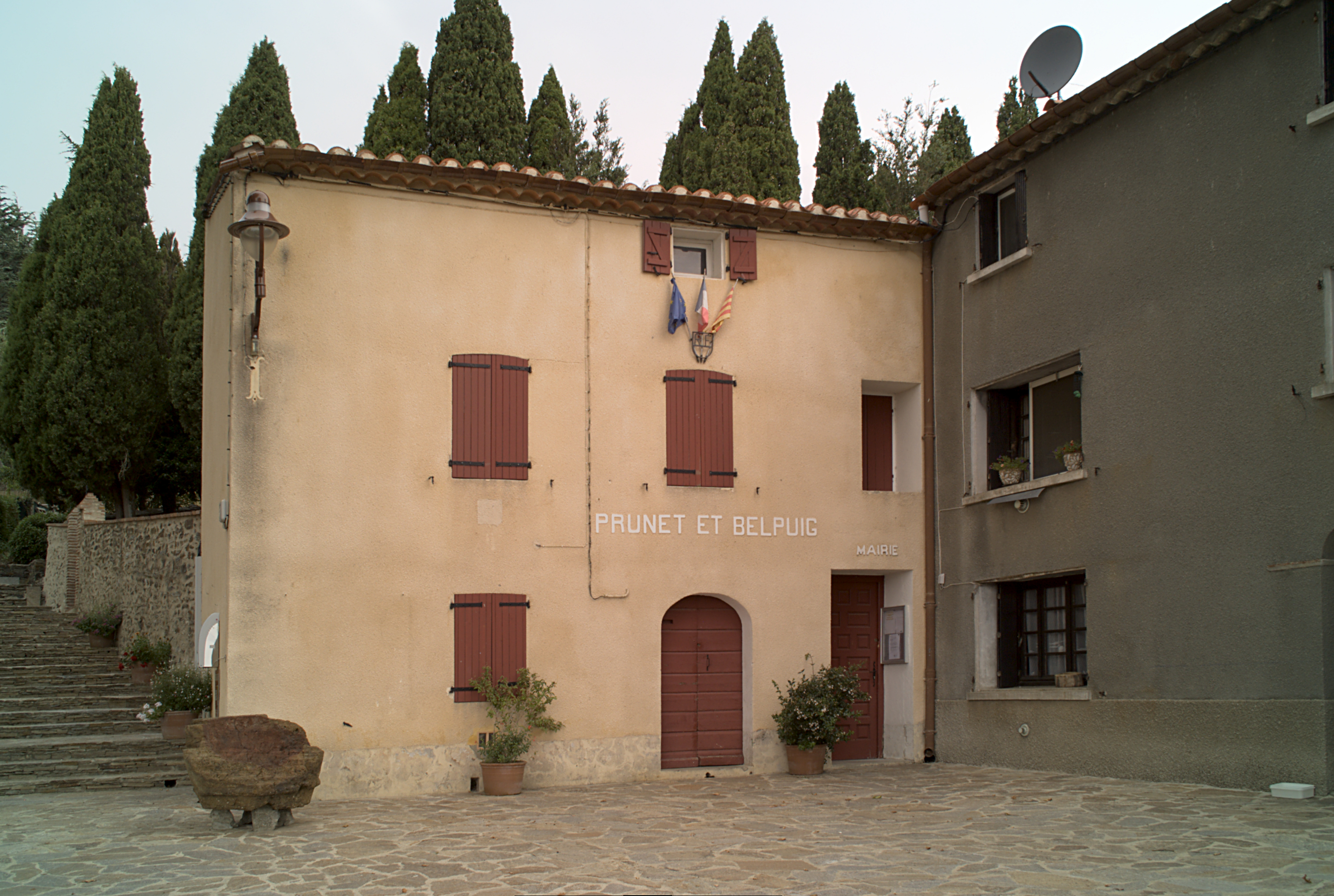 Mairie, Prunet-et-Belpuig (Pyrénées-Orientales, Languedoc-Roussillon, France)